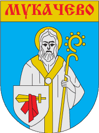 Герб Мукачева